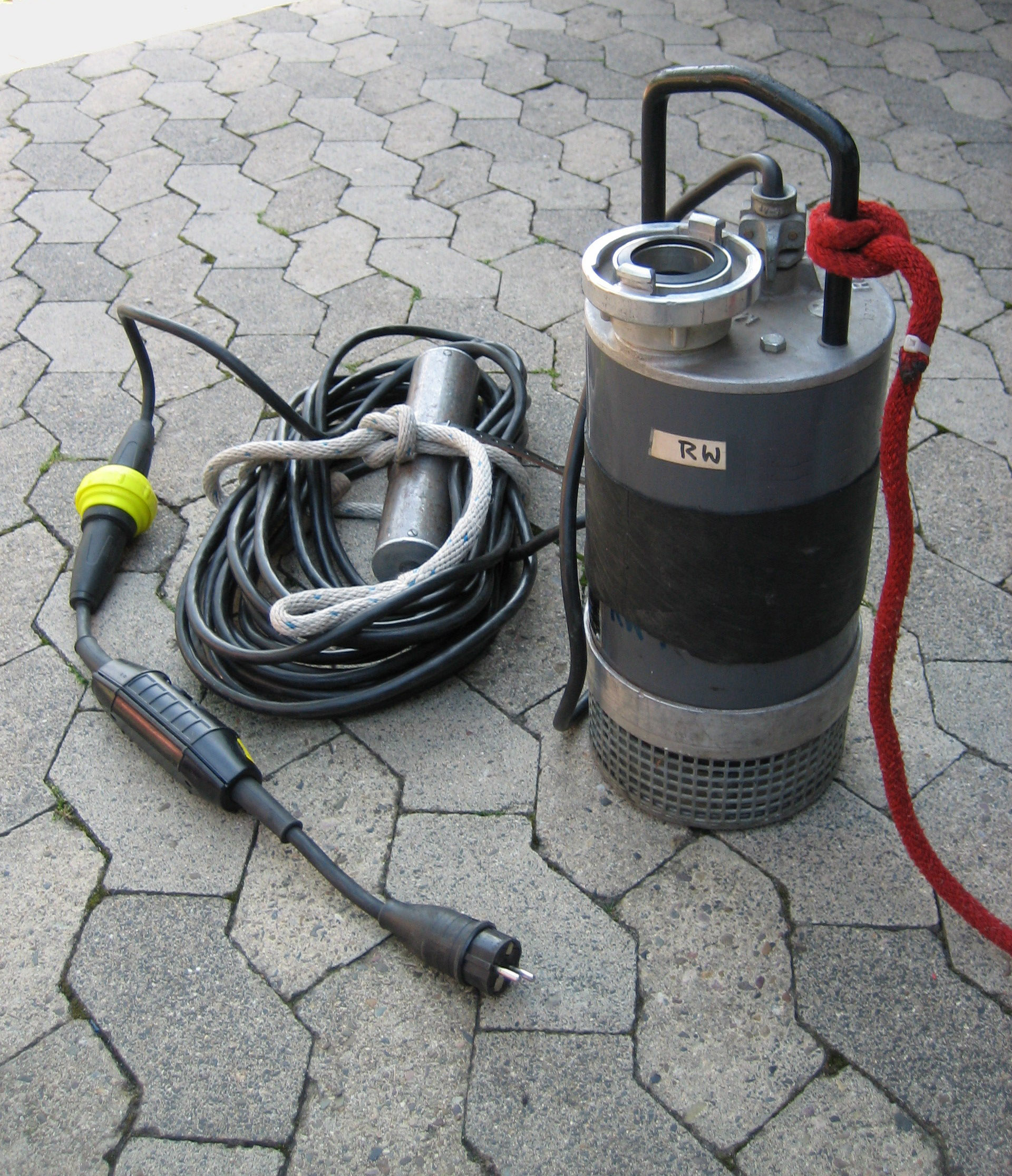 submersible pump